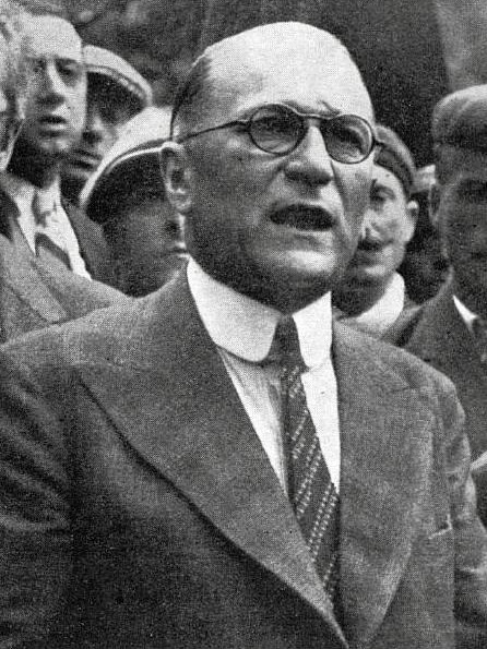 Antoine Ellen-Prévot, maire de Toulouse, en 1936.